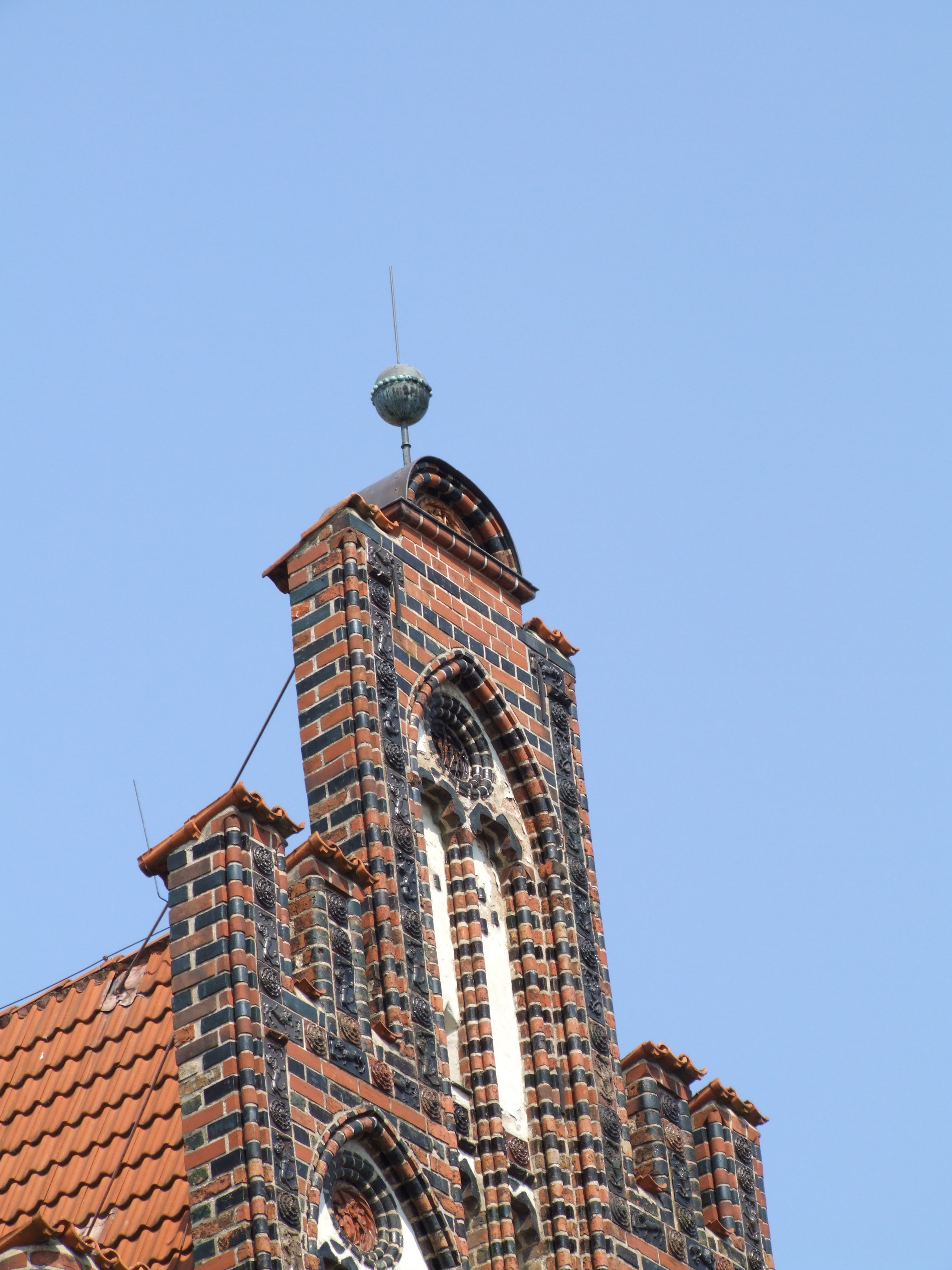 Dachschmuck in Kugelform, Rostock, Mecklenburg-Vorpommern, Deutschland